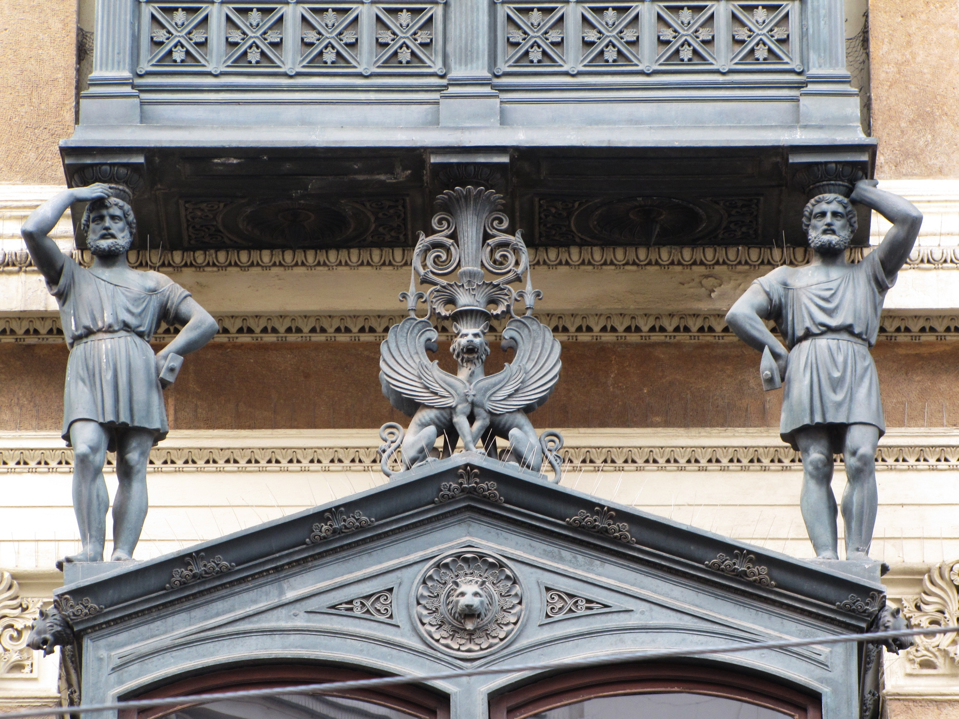 Detail z průčelí Kleinova paláce na Náměstí Svobody v Brně